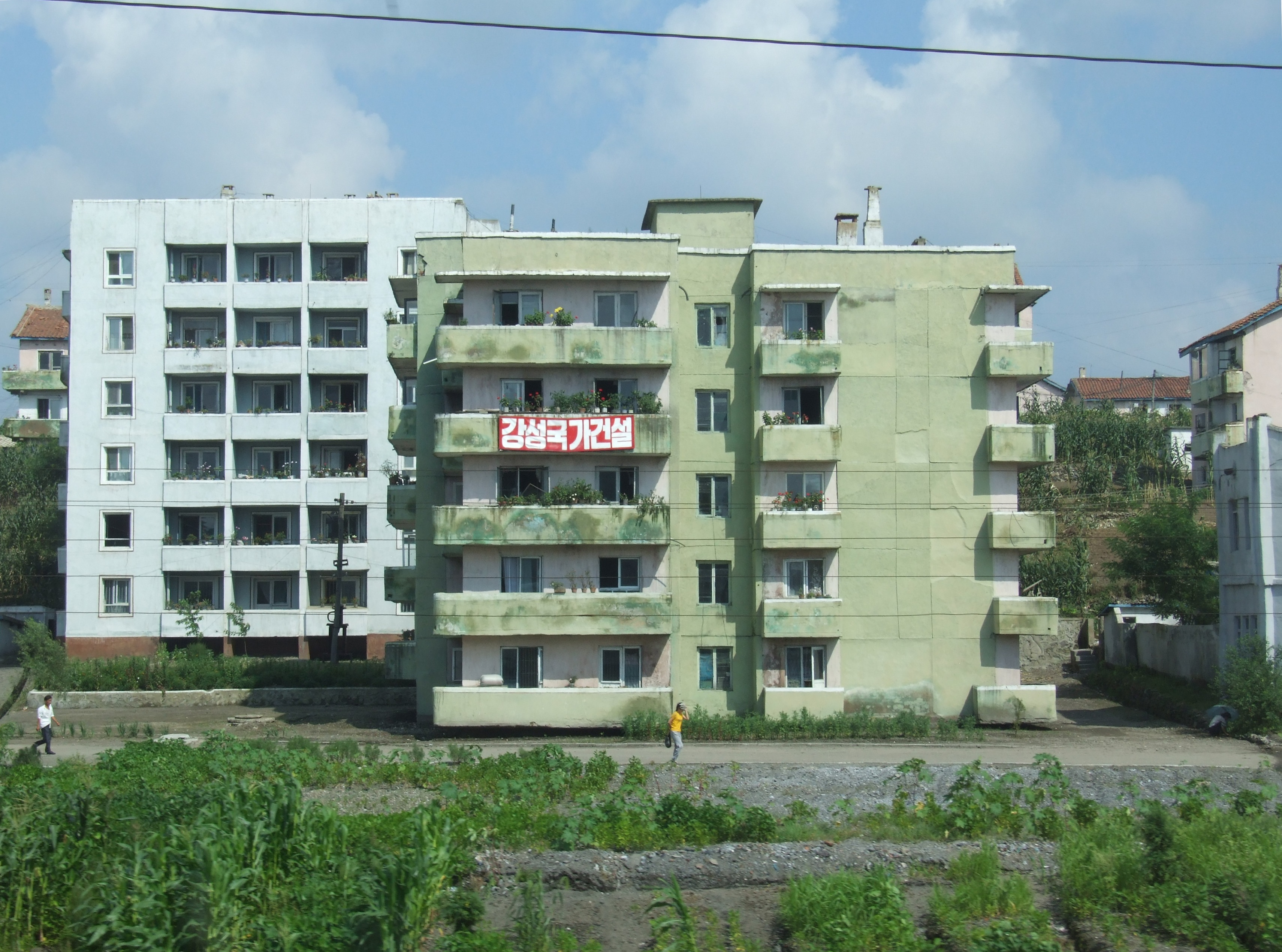 Wohnhaus in Nordkorea